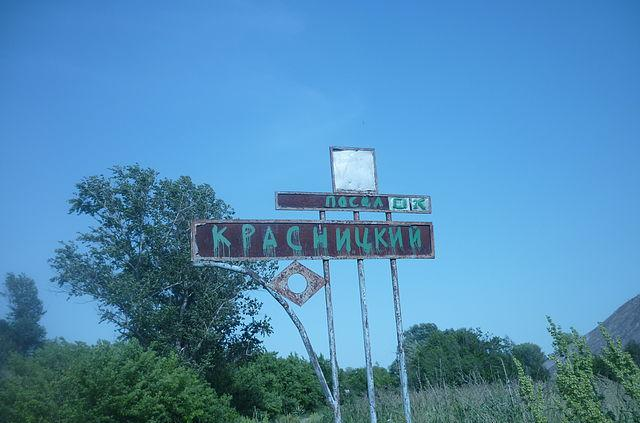 Знак посёлка